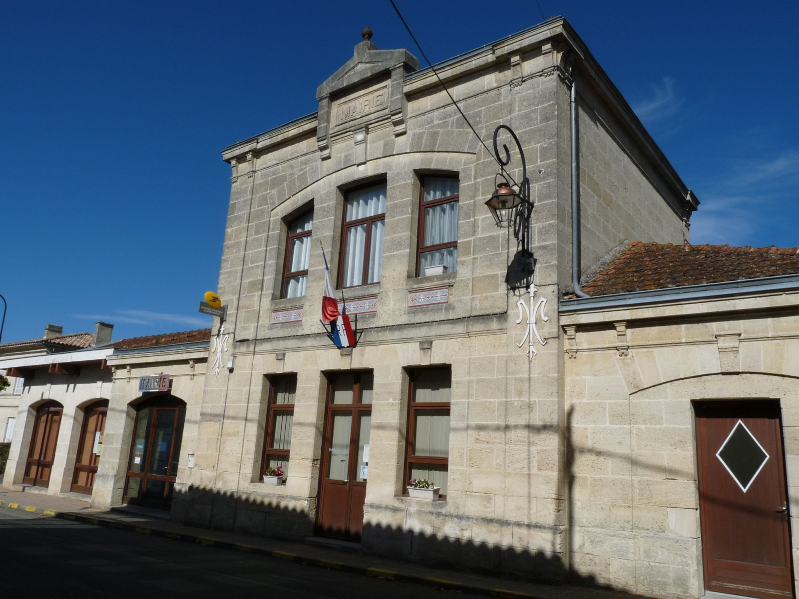 Mairie de Cézac, Gironde, France